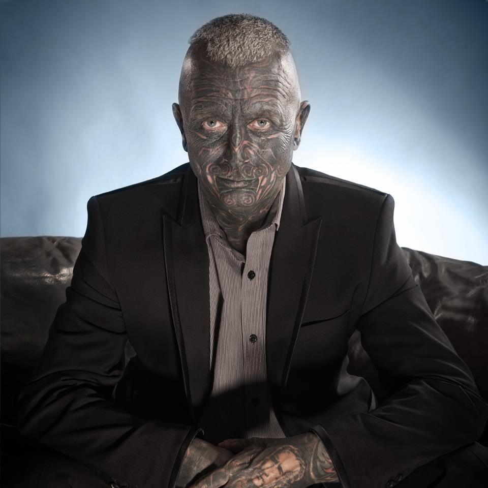 Fotografie vytvořená k účelu propagace prezidenského kandidáta nezávislou občanskou iniciativou "Vladimír Franz prezidentem", která ji uvolnila na svém webu k volnému použití.